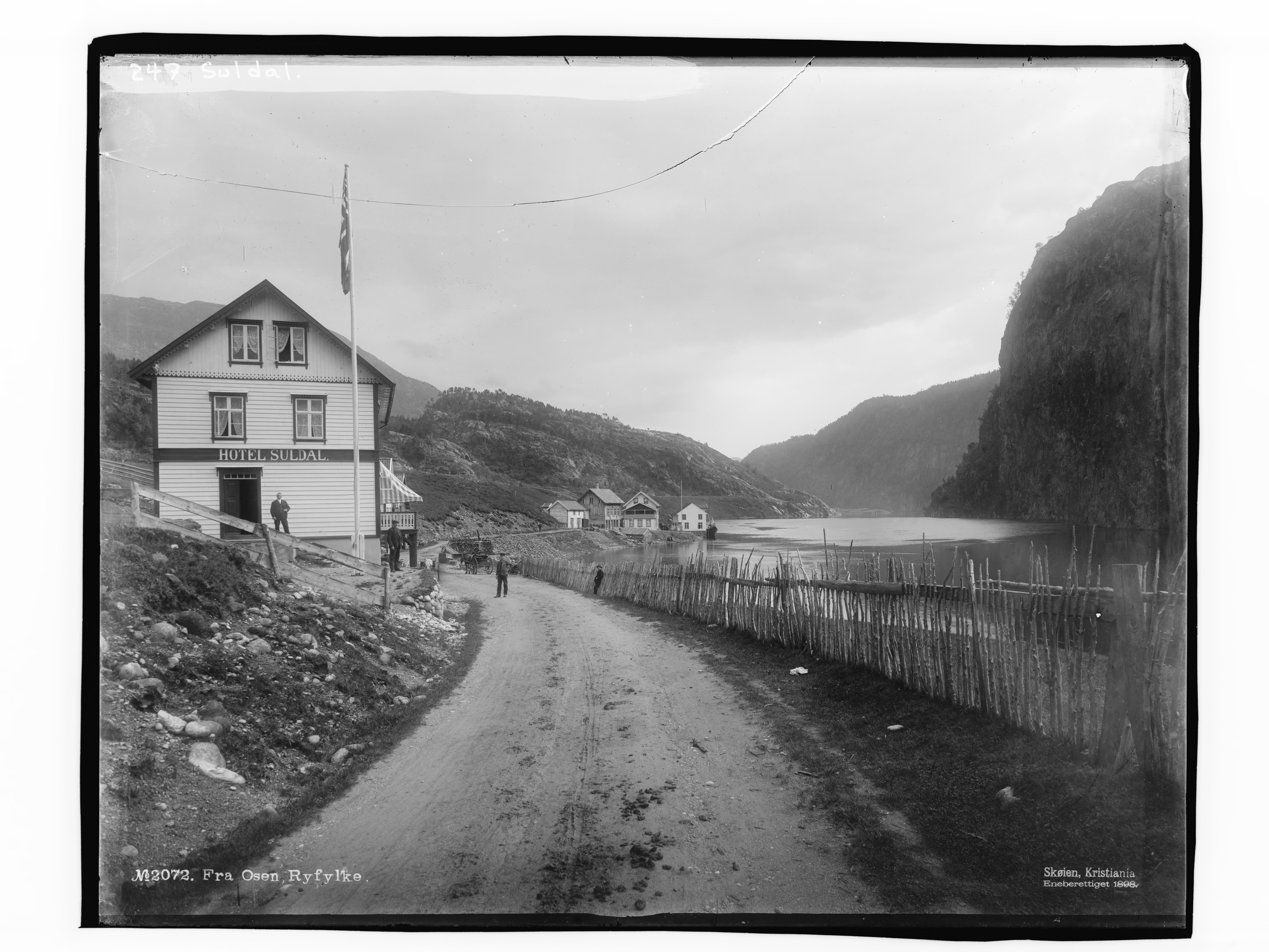 Påskrift negativ: No2072. Fra Osen. Ryfylke Skøien, Kristiania Eneberettiget 1898. Påskrift negativ: 247 Suldal [Riksantikvaren] Påskrift konvolutt: B-247 Suldal. Suldalsosen. Hotel Suldal [Riksantikvaren] [Negativet er eksponert med speilvendt resultat. Rettet opp.] Sted: Ryfylke,Suldalsosen,Suldalsvatnet Kommune: Suldal Fylke: Rogaland Tagger: landskap innsjø Hotel Suldal hotell